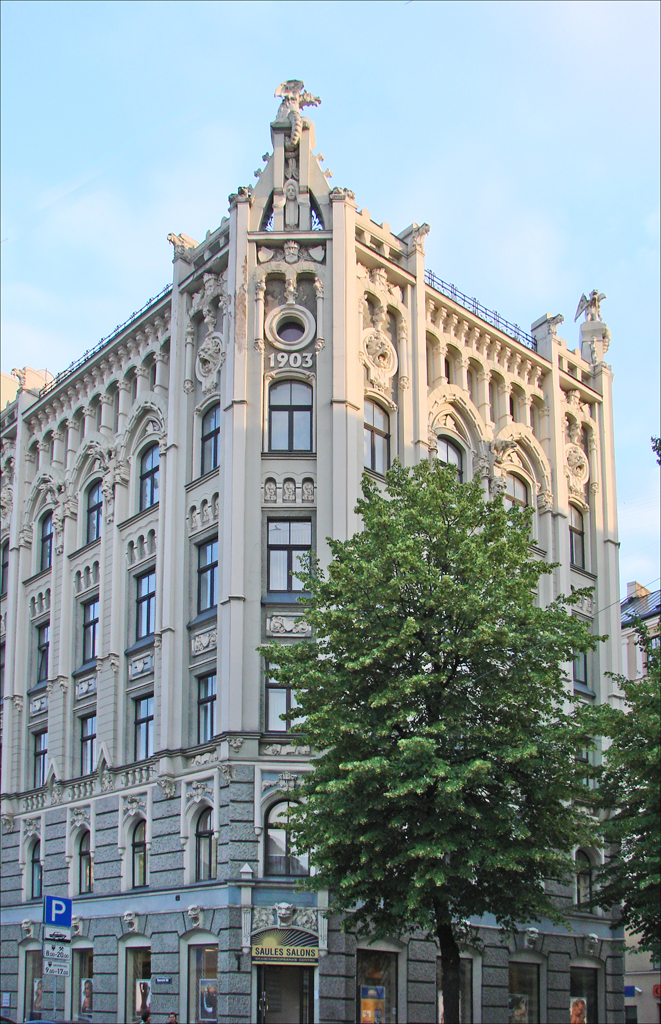 Vue d'ensemble de l'immeuble art nouveau au n° 28 de la rue Blaumana (Blaumana Iela) à Riga Cet Immeuble art nouveau (jugendstil) d'habitation et de locaux commerciaux a été conçu en 1903 par l'architecte Kārlis Johans Felsko (1844–1918) Le site du musée d'art nouveau de Riga sur cet immeuble __________ Riga, capitale de la Lettonie, est un parfait exemple de ville Art Nouveau. Son centre abrite la plus belle concentration de bâtiments Art nouveau au monde: plus d'un tiers d'entre eux appartiennent en effet à ce style. Cet ensemble architectural est inscrit sur la liste du Patrimoine mondial.... Extrait du site du réseau des villes art nouveau